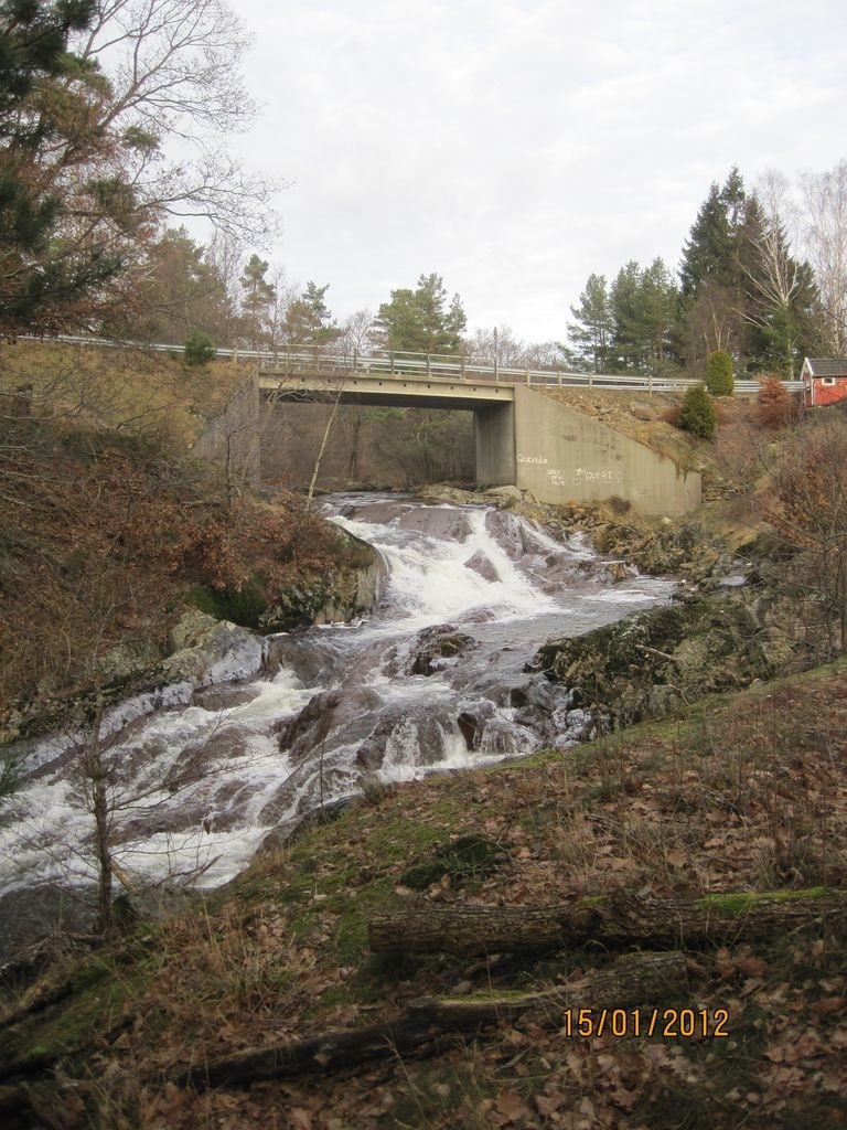 Moelven rett ovenfor Lillesand første elektrisitetsverk - Kulturminne 2012